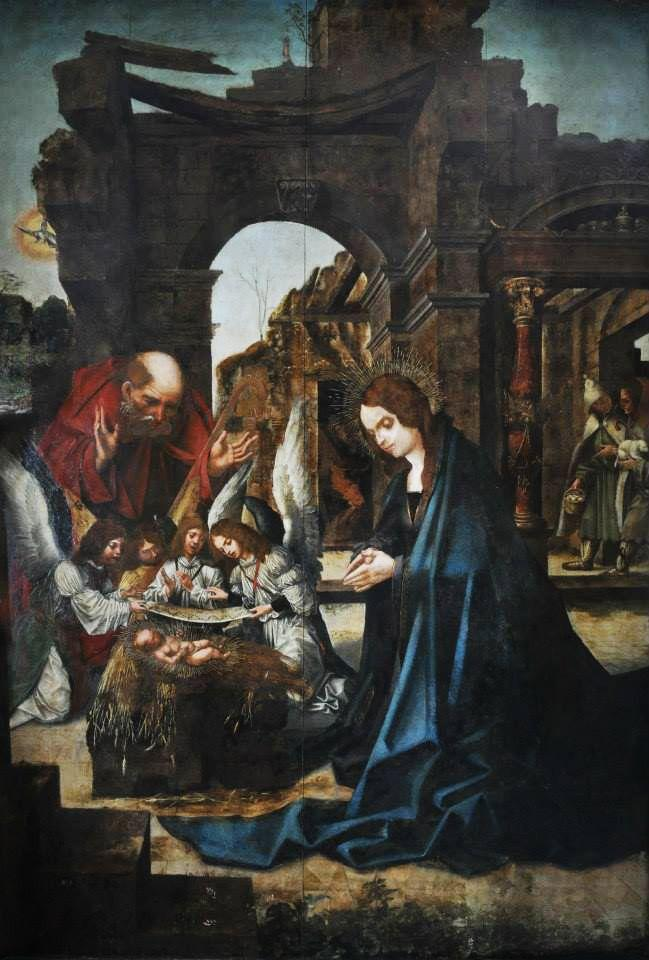 Painel da Natividade no Retábulo da Capela-mor da Sé do Funchal. Oficina de Francisco Henriques ou do mestre da Lourinhã.